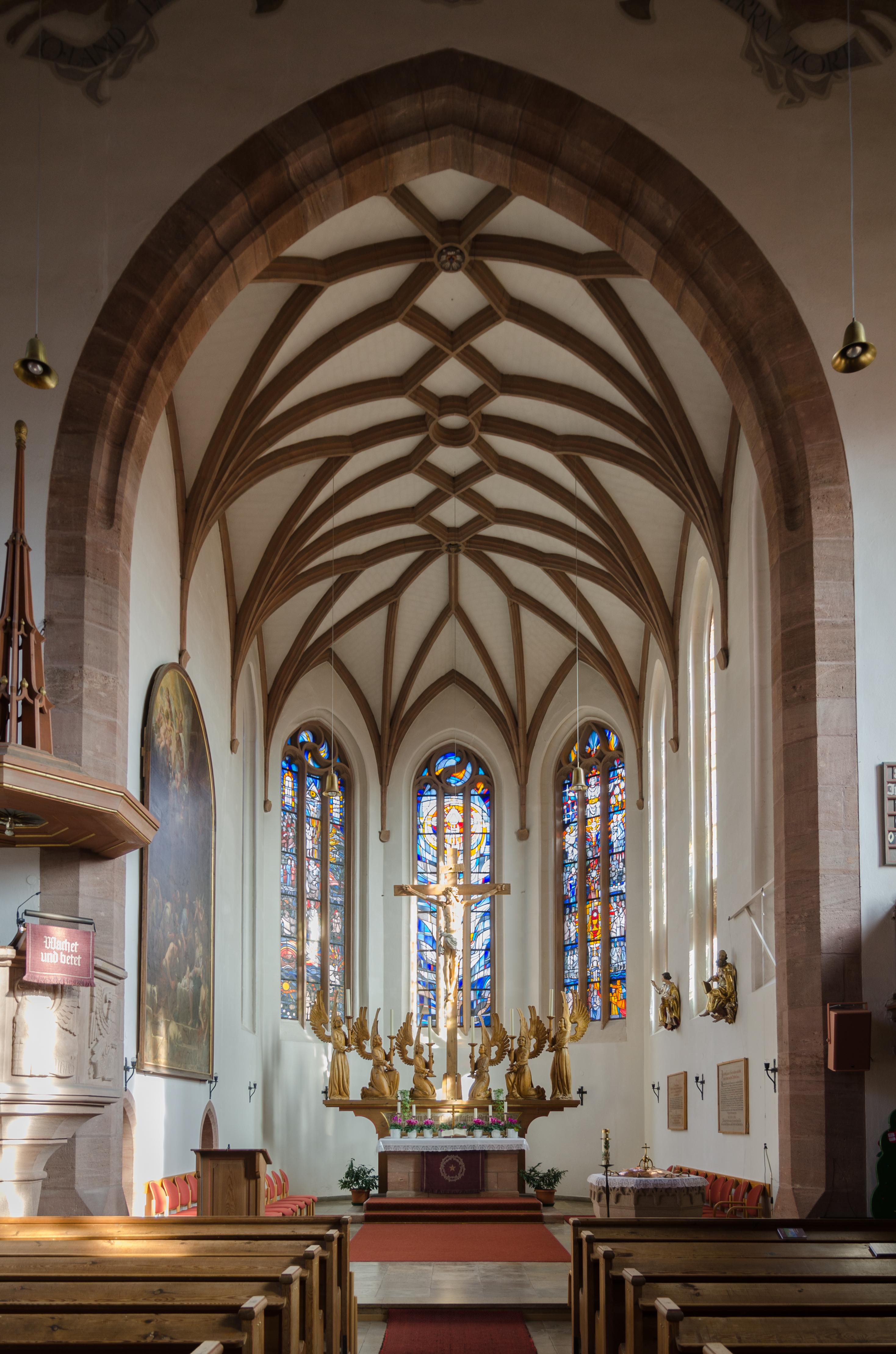 Merkendorf, ev. Stadtpfarrkirche Unser Lieben Frau